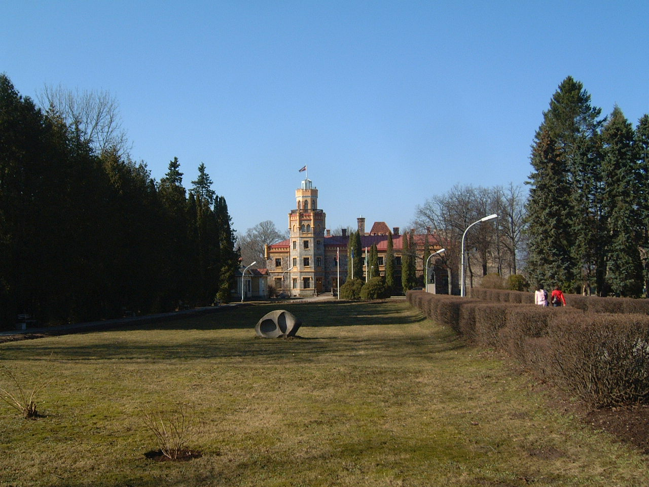 Castel at Sigulda, Latvia